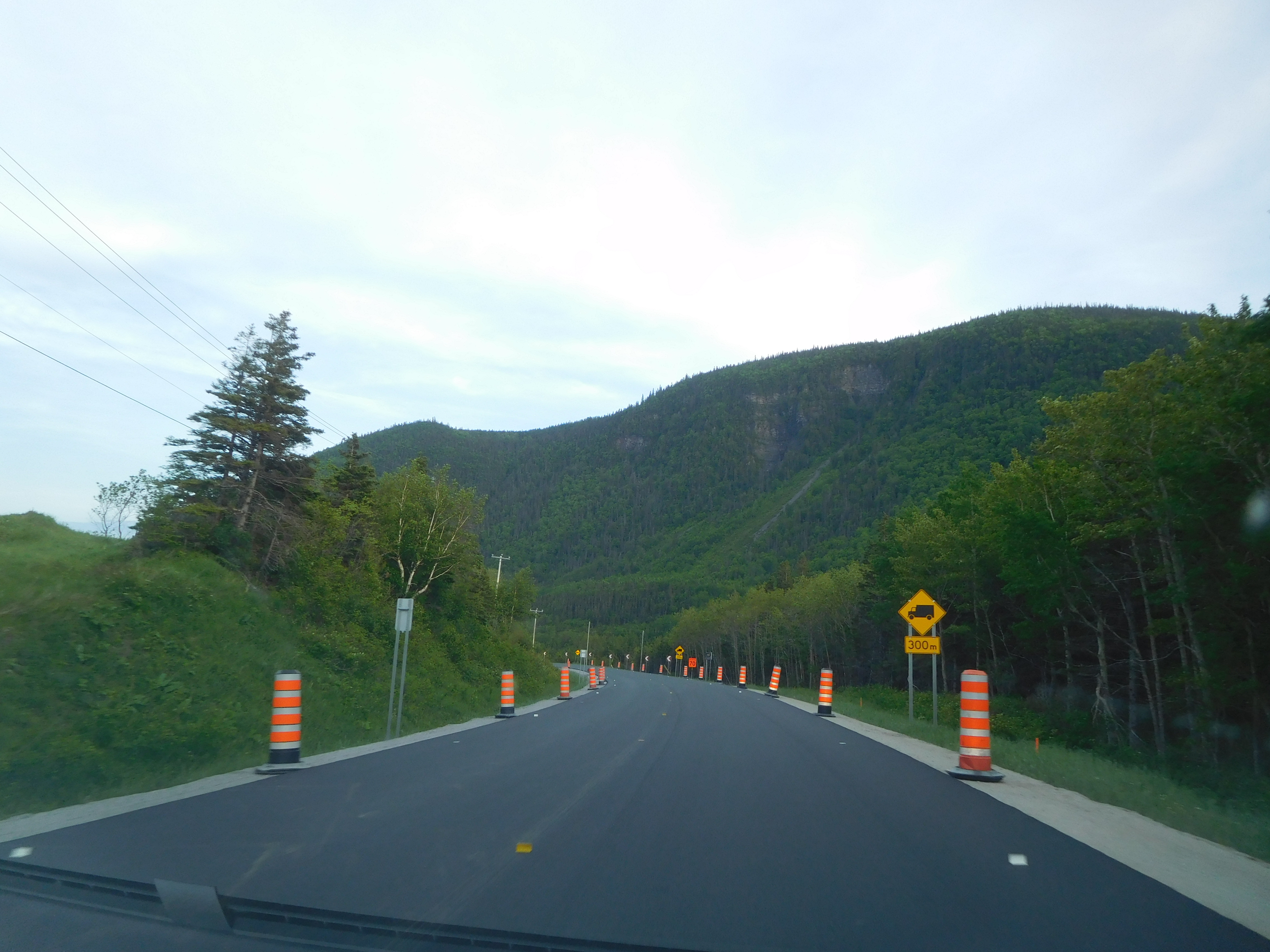 Route du Lac, L'Anse-Pleureuse, Saint-Maxime-du-Mont-Louis, Québec